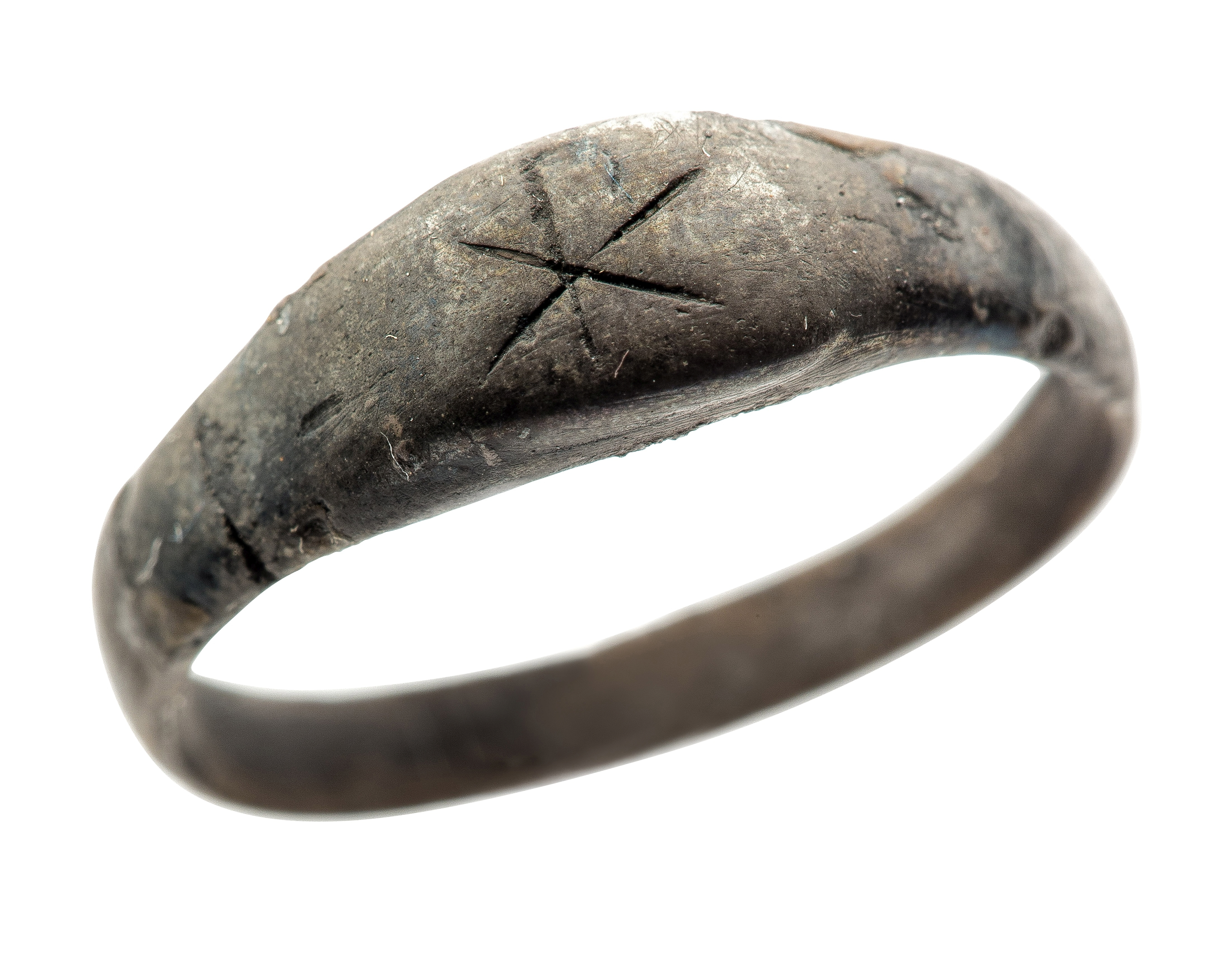 Vingerring met christogram in zilver, 300 tot 400 NC, vindplaats: Tongeren, noordoostgrafveld, Jaminéstraat, 1982, zone A, graf 21, collectie Gallo-Romeins Museum Tongeren, 82.H.1